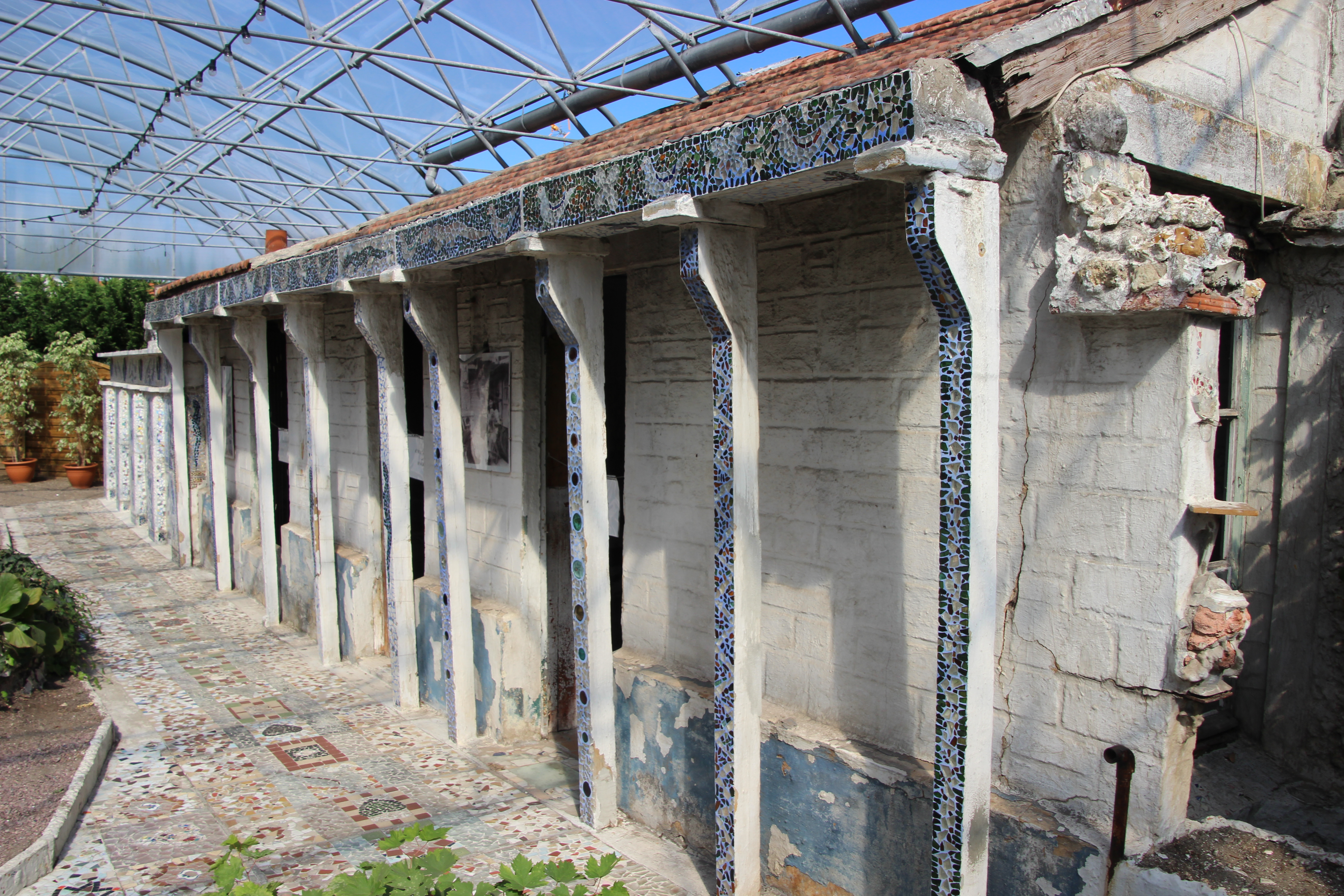 Maison de da Costa maison bleue de Dives-sur-Mer